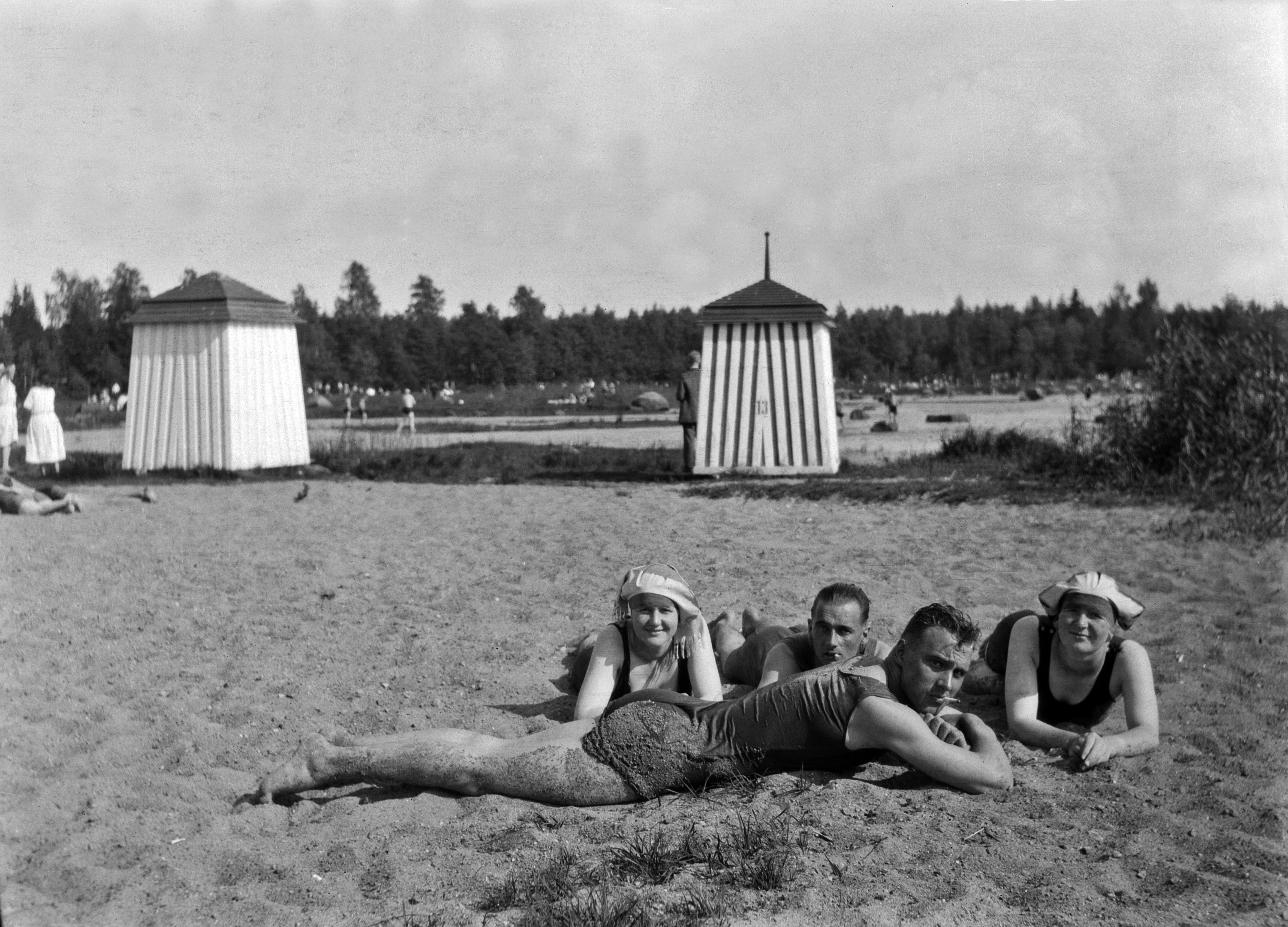 Lauttasaaren uimaranta " Kasinon ranta "; negatiivi, nitraatti, mv